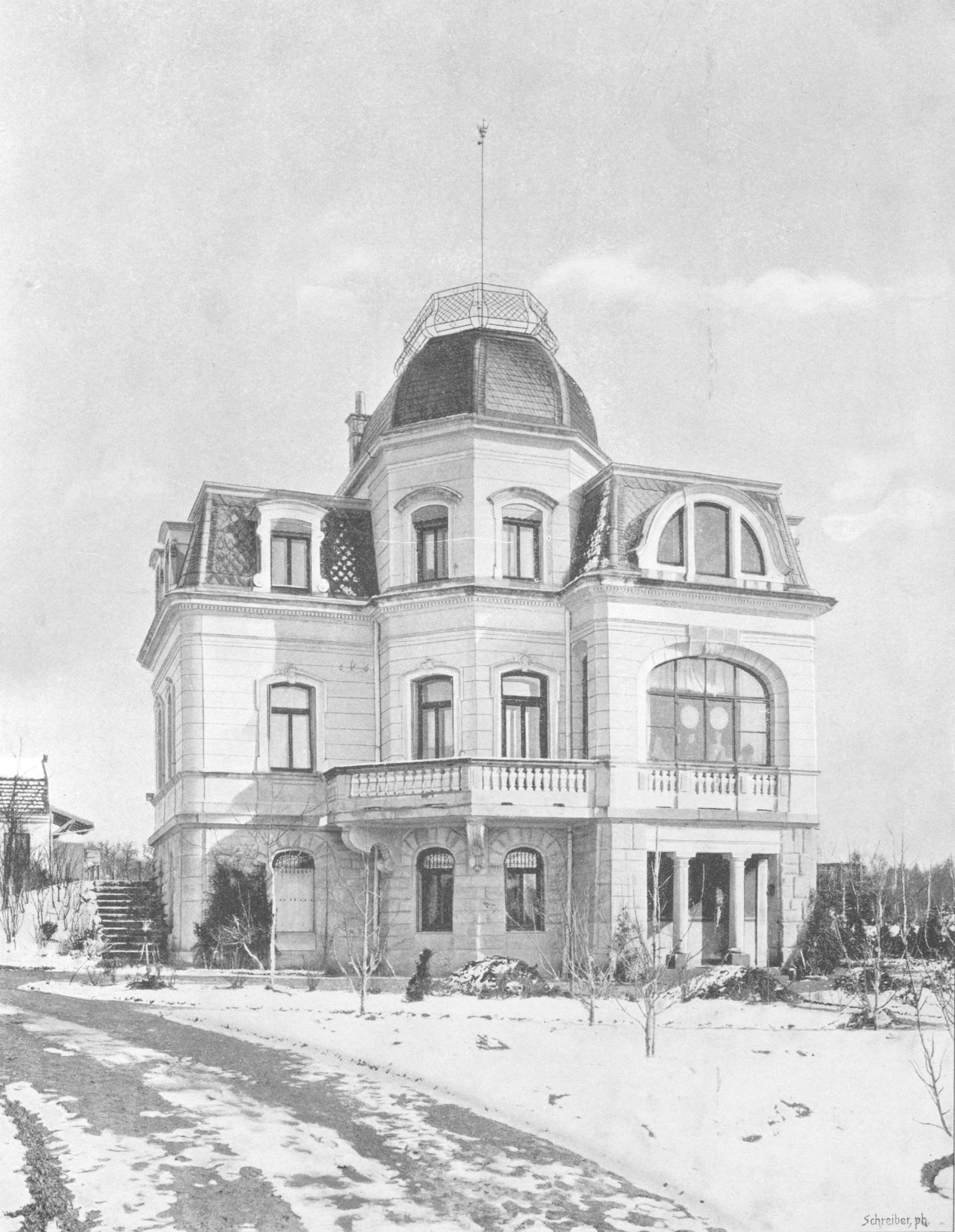 Wohn- und Landhaus Major von Luck von Carl Friedrich Beisbarth jun., Stuttgart-Degerloch.